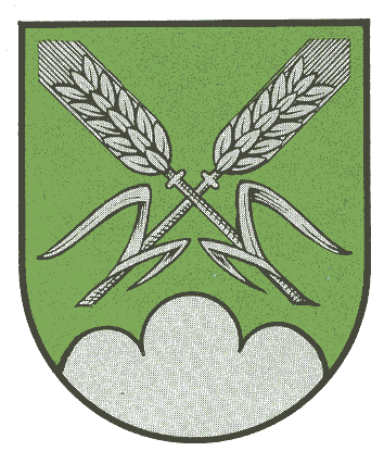 Wappen von Relsberg